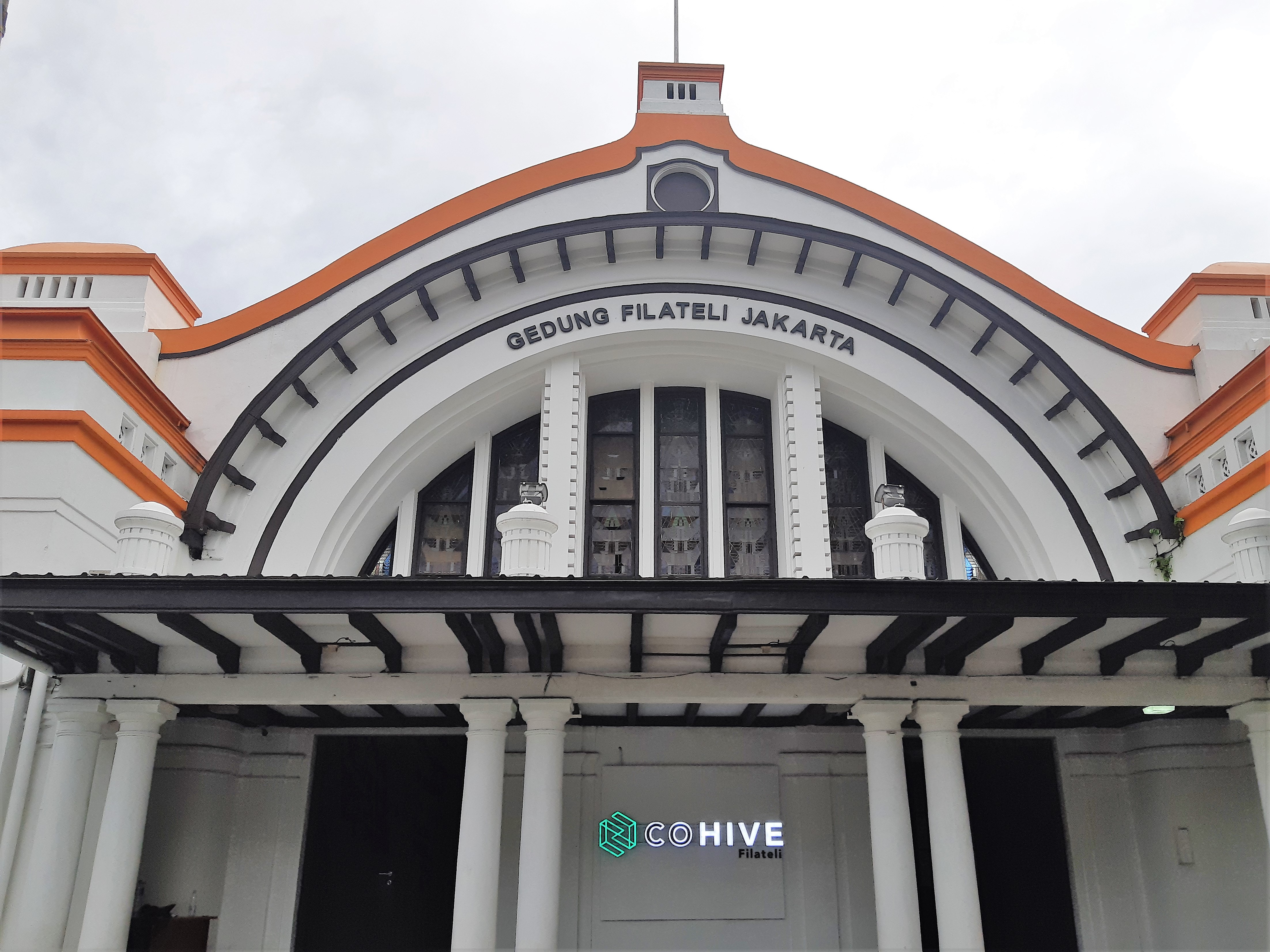 Gedung Filateli Jakarta